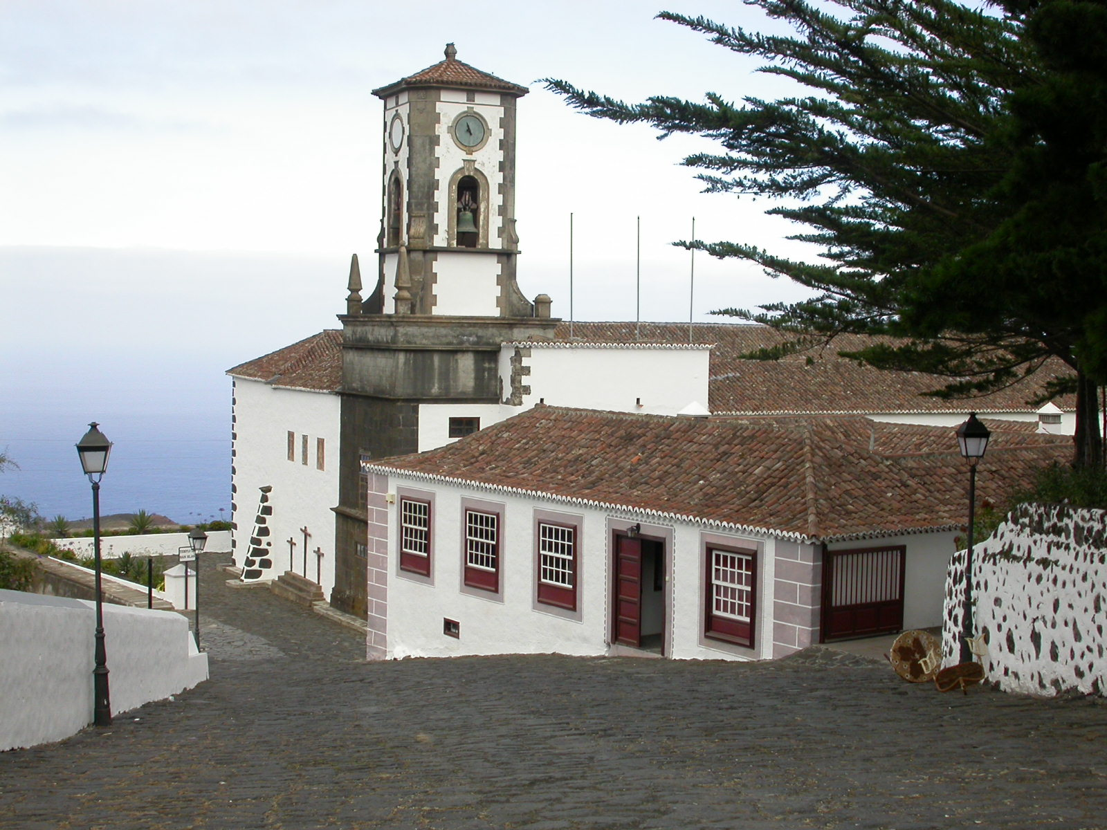 Iglesia de San Juan Bautista en Mazo (La Palma)